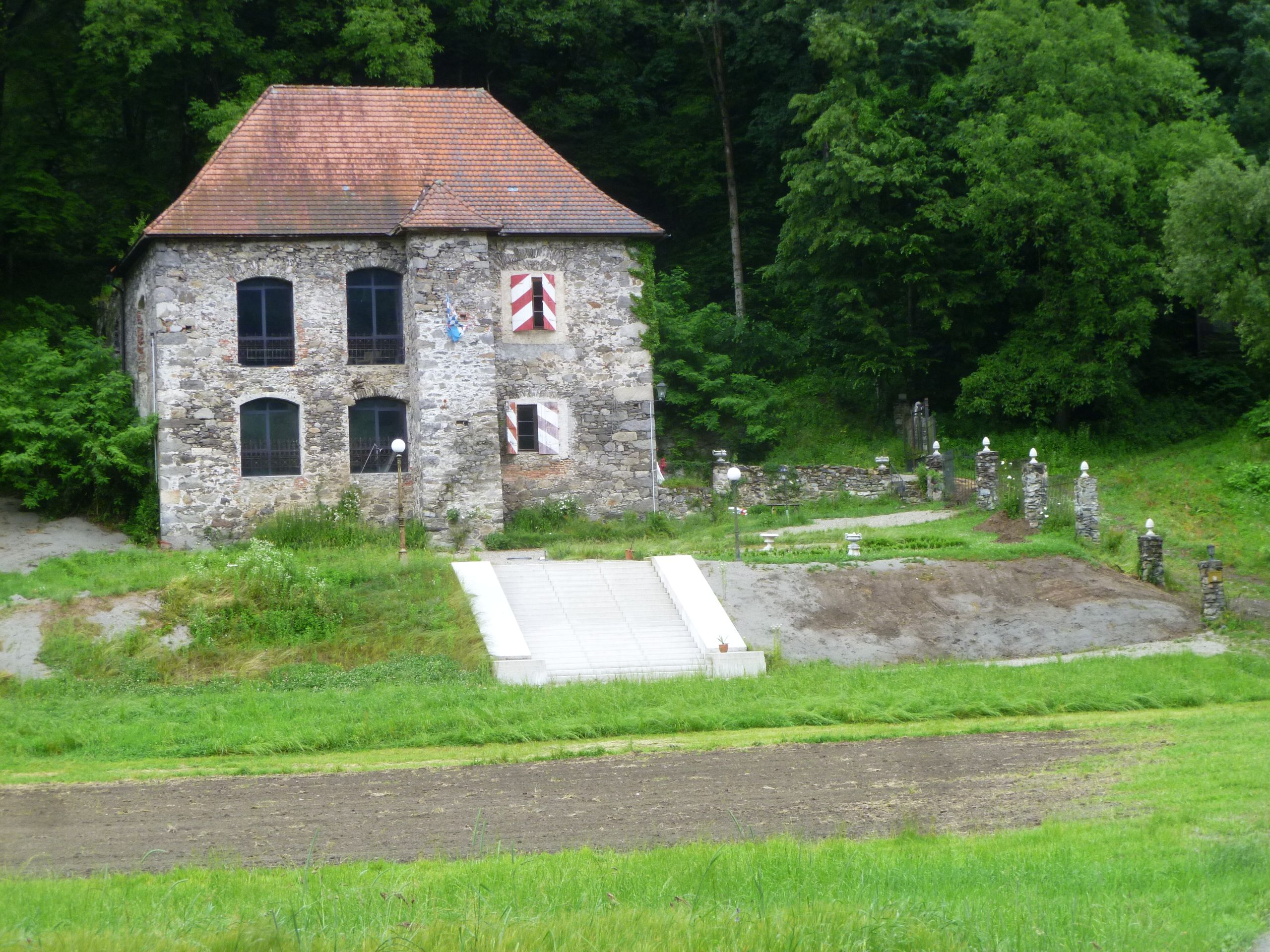 Schloss Freizell